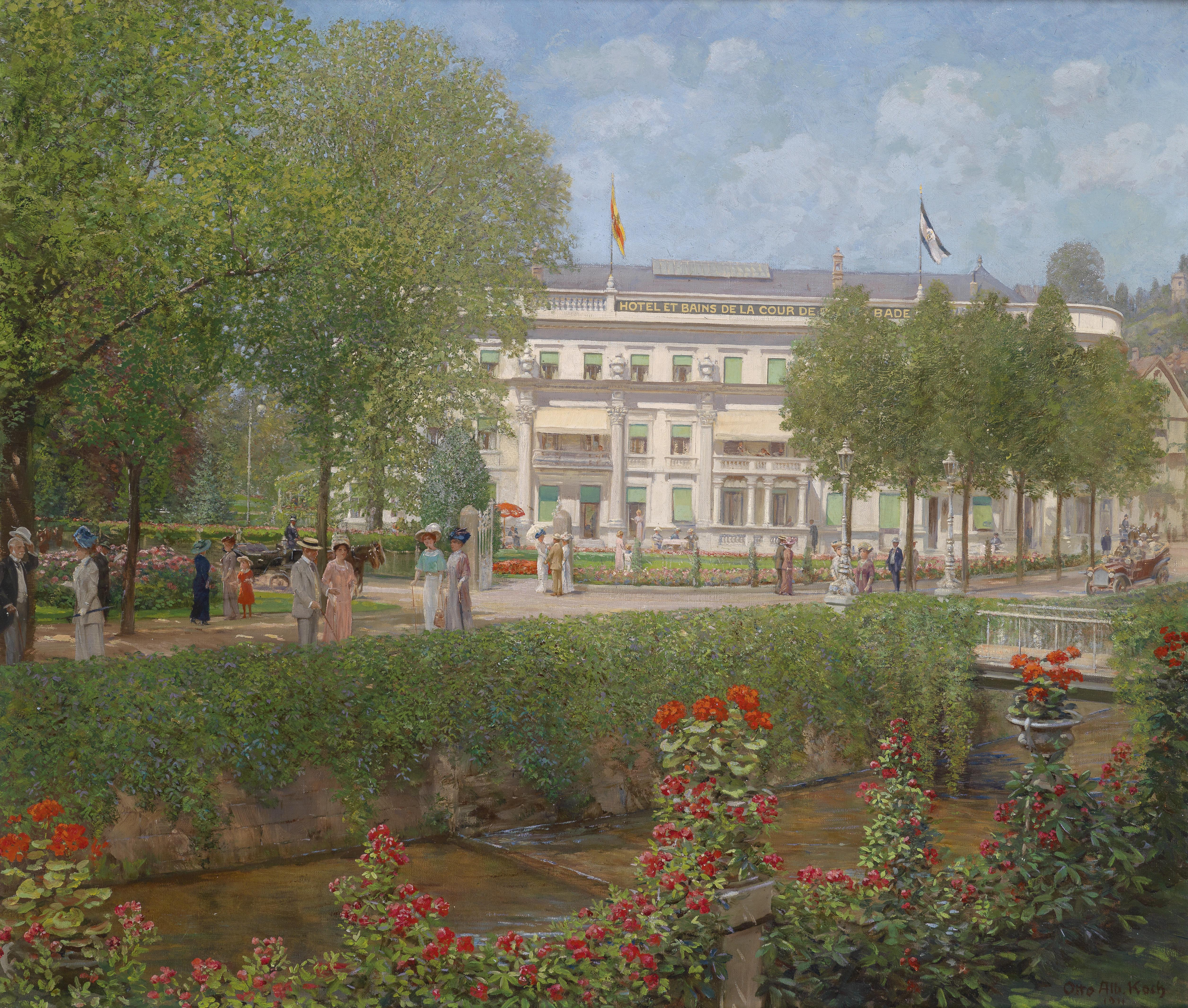 Blick auf das Kurhotel in Baden-Baden, signiert, datiert Otto Alb. Koch 1911, Öl auf Leinwand, 65 x 78 cm